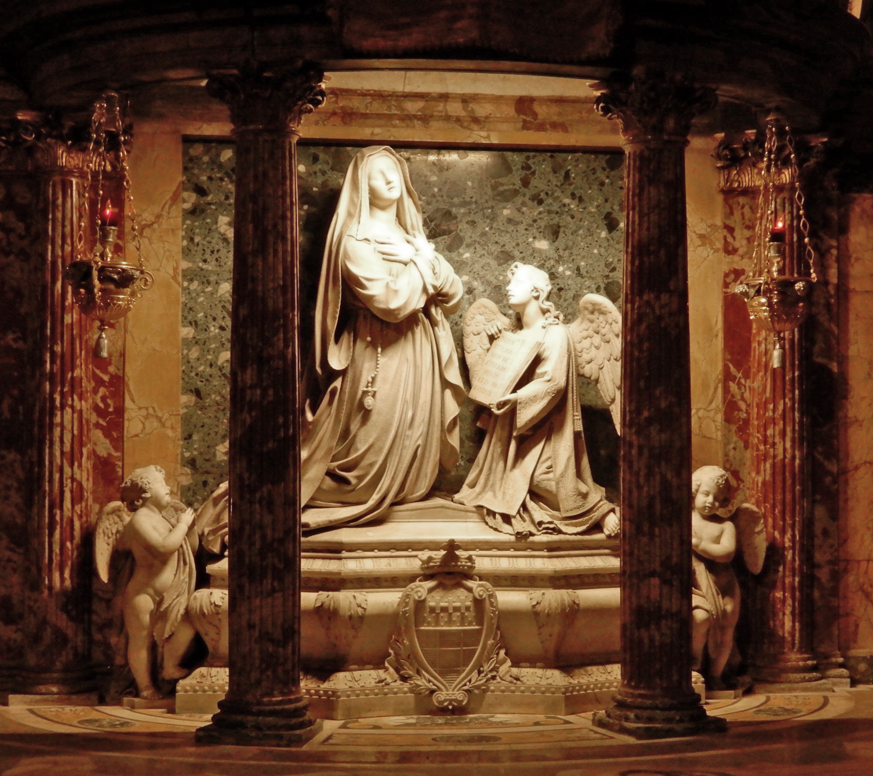 Roma, chiesa di Santa Francesca Romana, interno, statua della santa